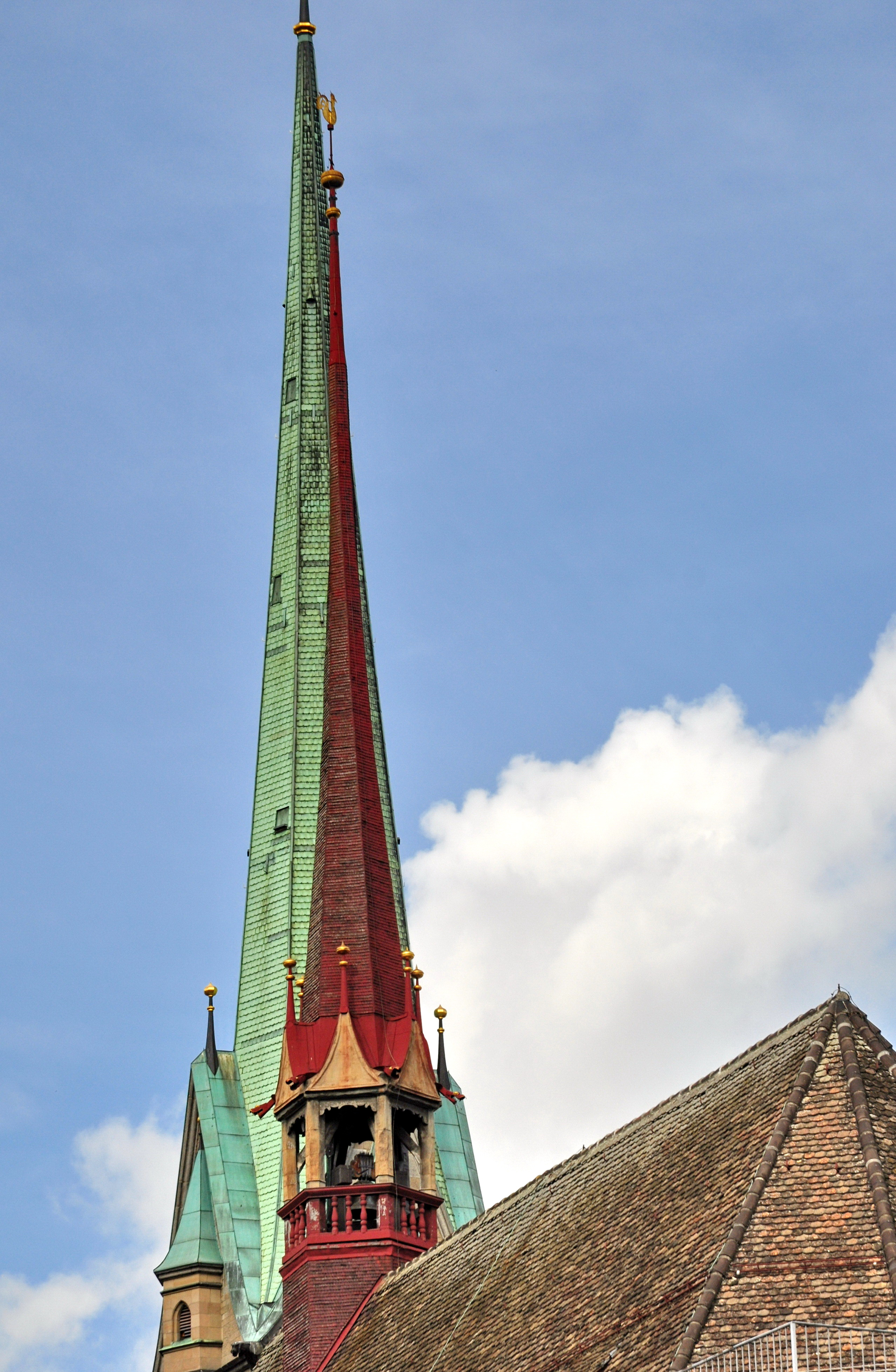 Predigerkirche in Zürich (Switzerland)